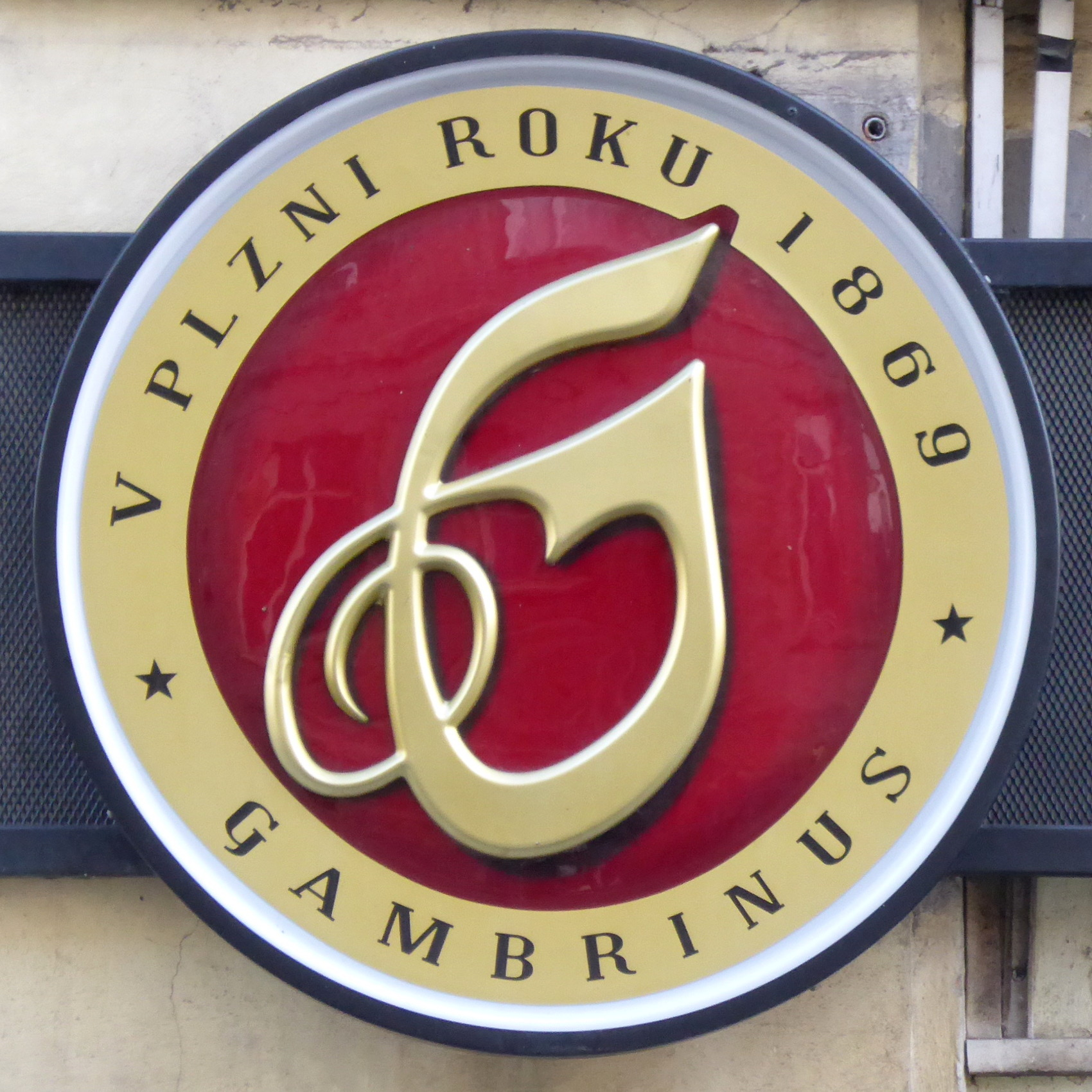 Známka pivovaru Gambrinus v Plzni.